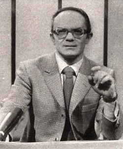 Giornalista Mario Pastore